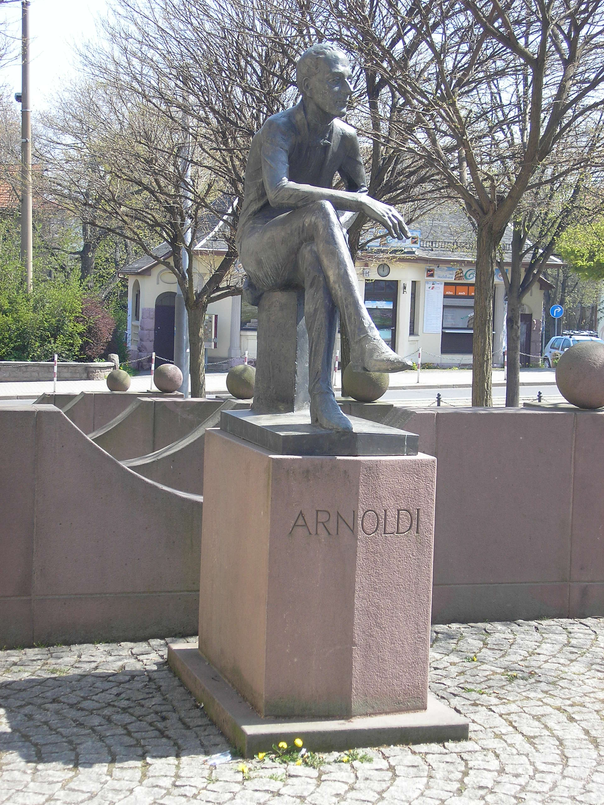 Die Arnoldi-Statue in Gotha (Thüringen).